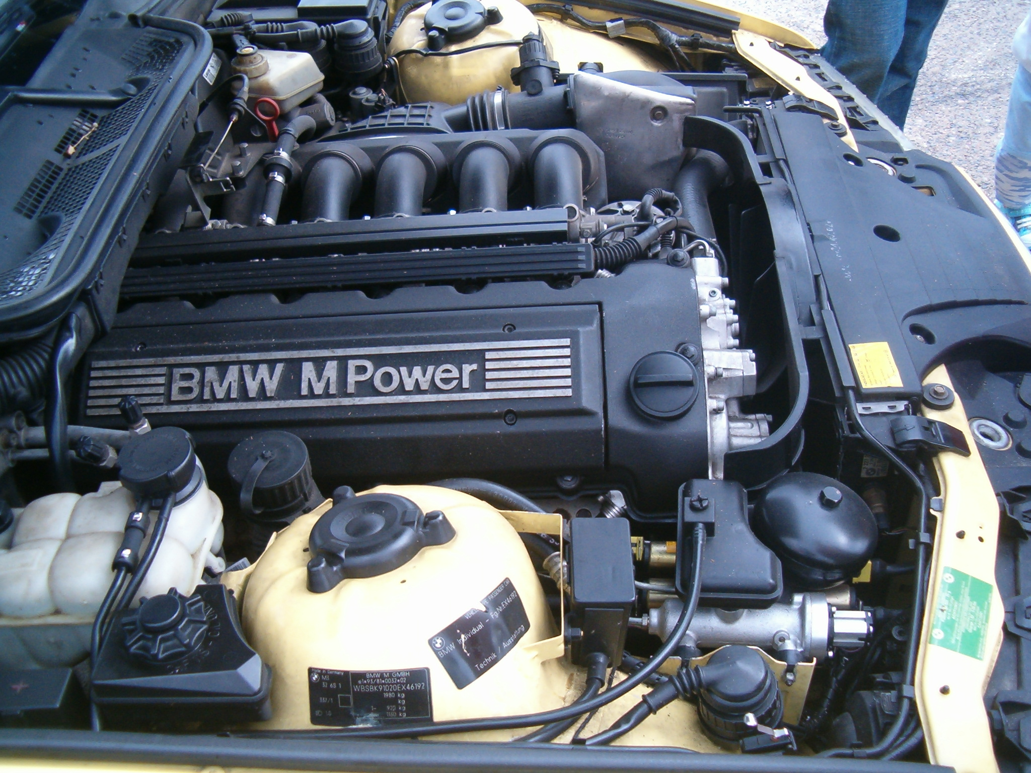 M3 Cabrio Individual e36, silnik S50 3,2l. Zlot BMW M Power Club w Toruniu.